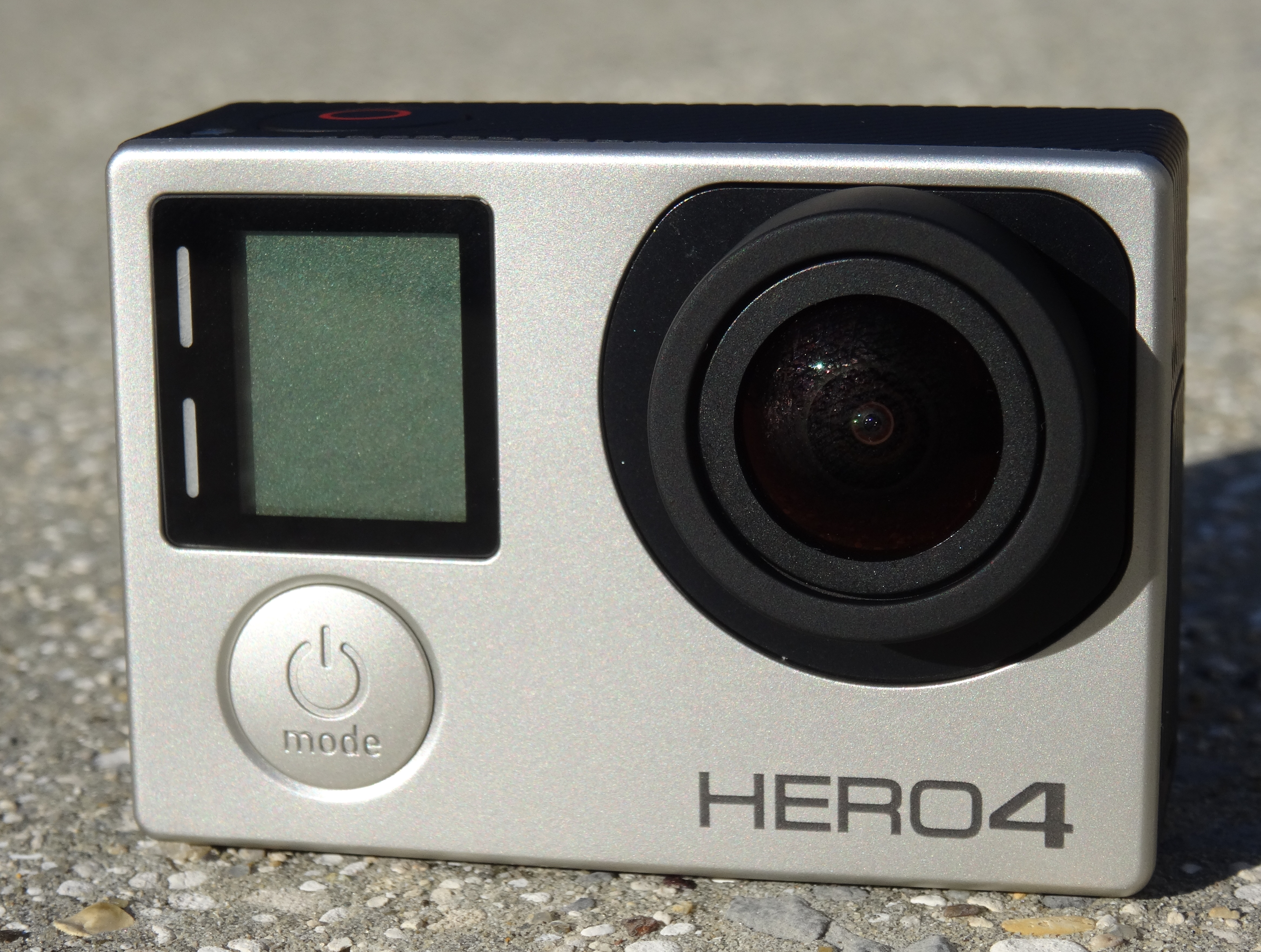 Cyclisme & GoPro : GoPro Hero 4 et accessoires.